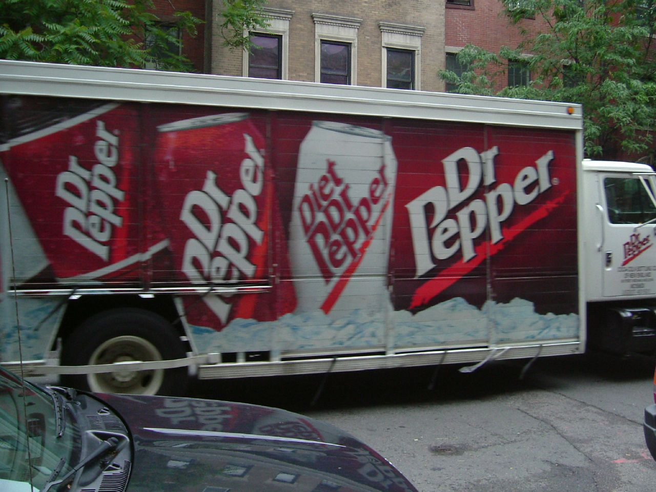 Dr Pepper